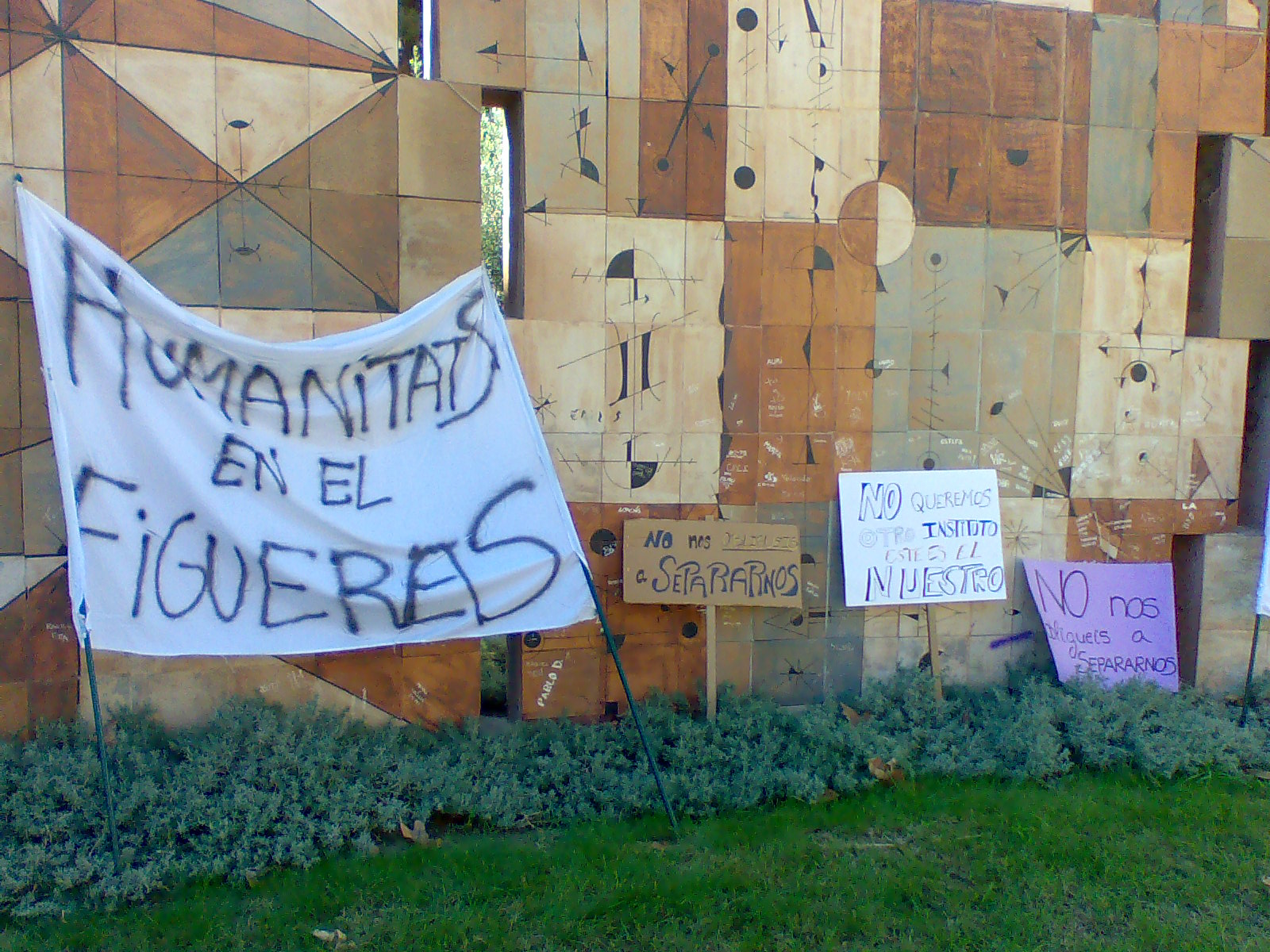 Protestes en 2008 per les expulsions de 60 estudiants